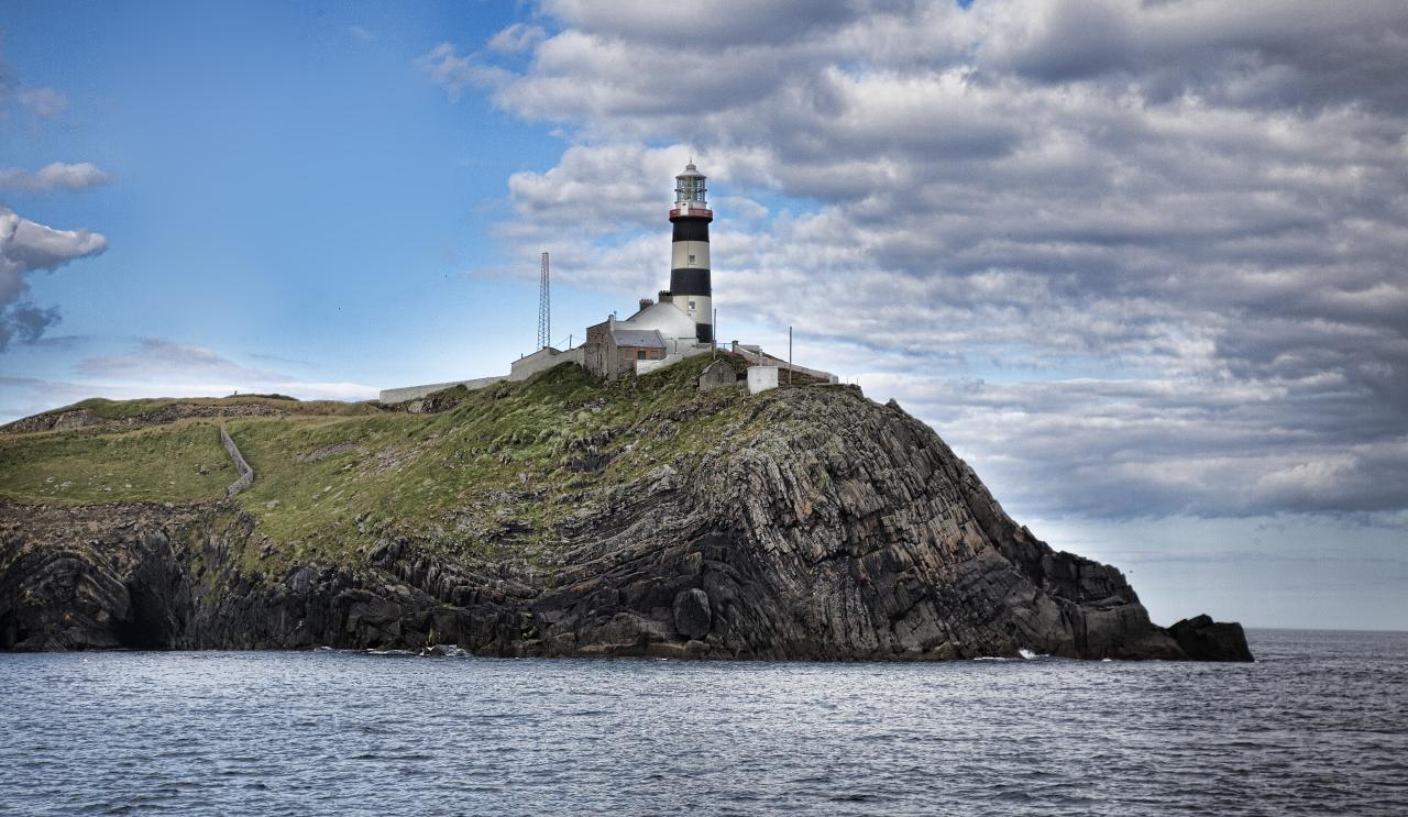 kinsale